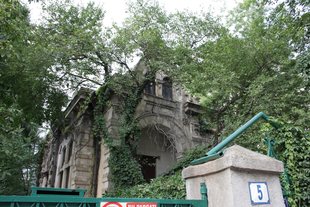 Casă, Str. Sevastopol 5 sector 1